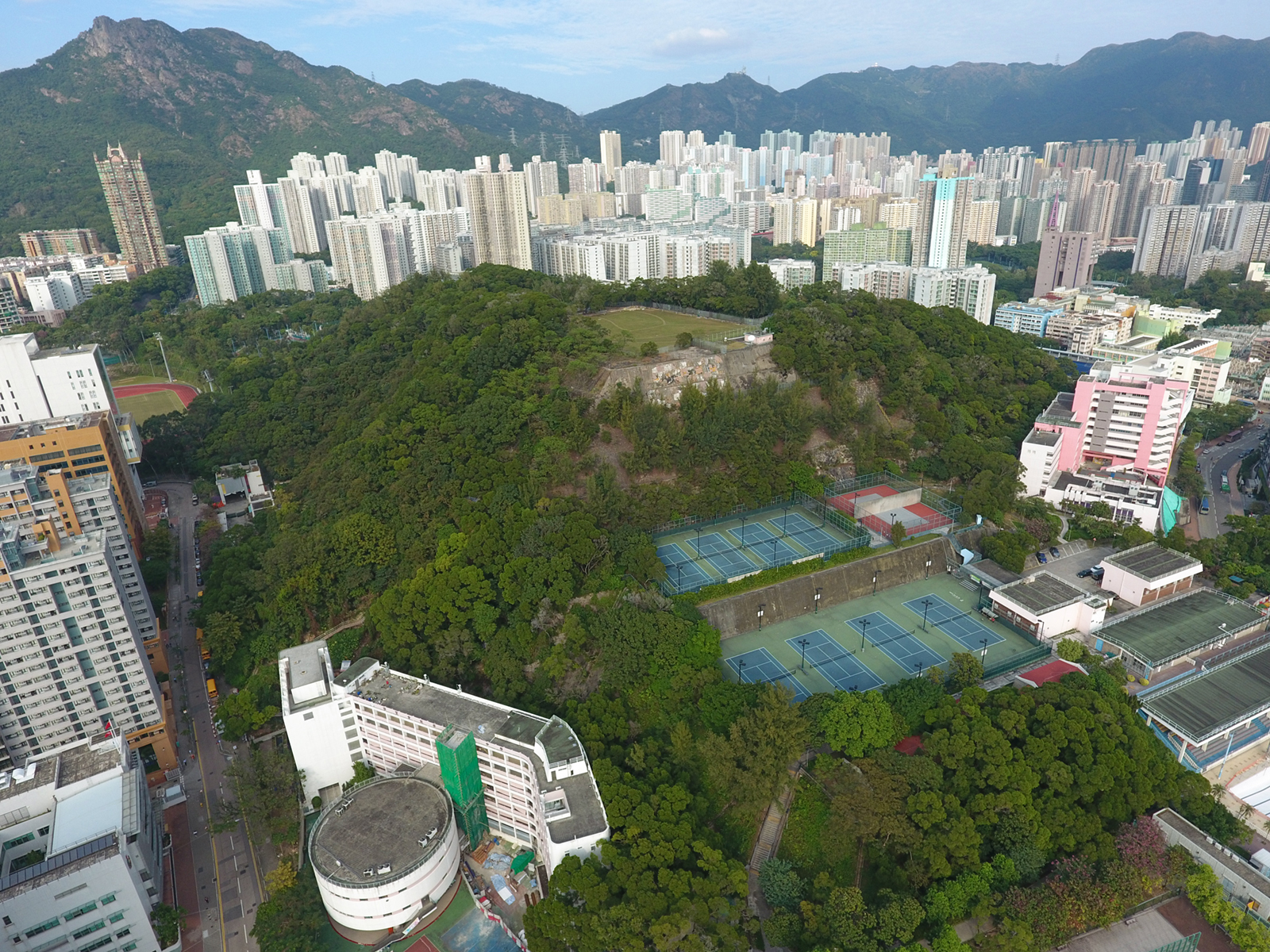 Checkerboard Hill